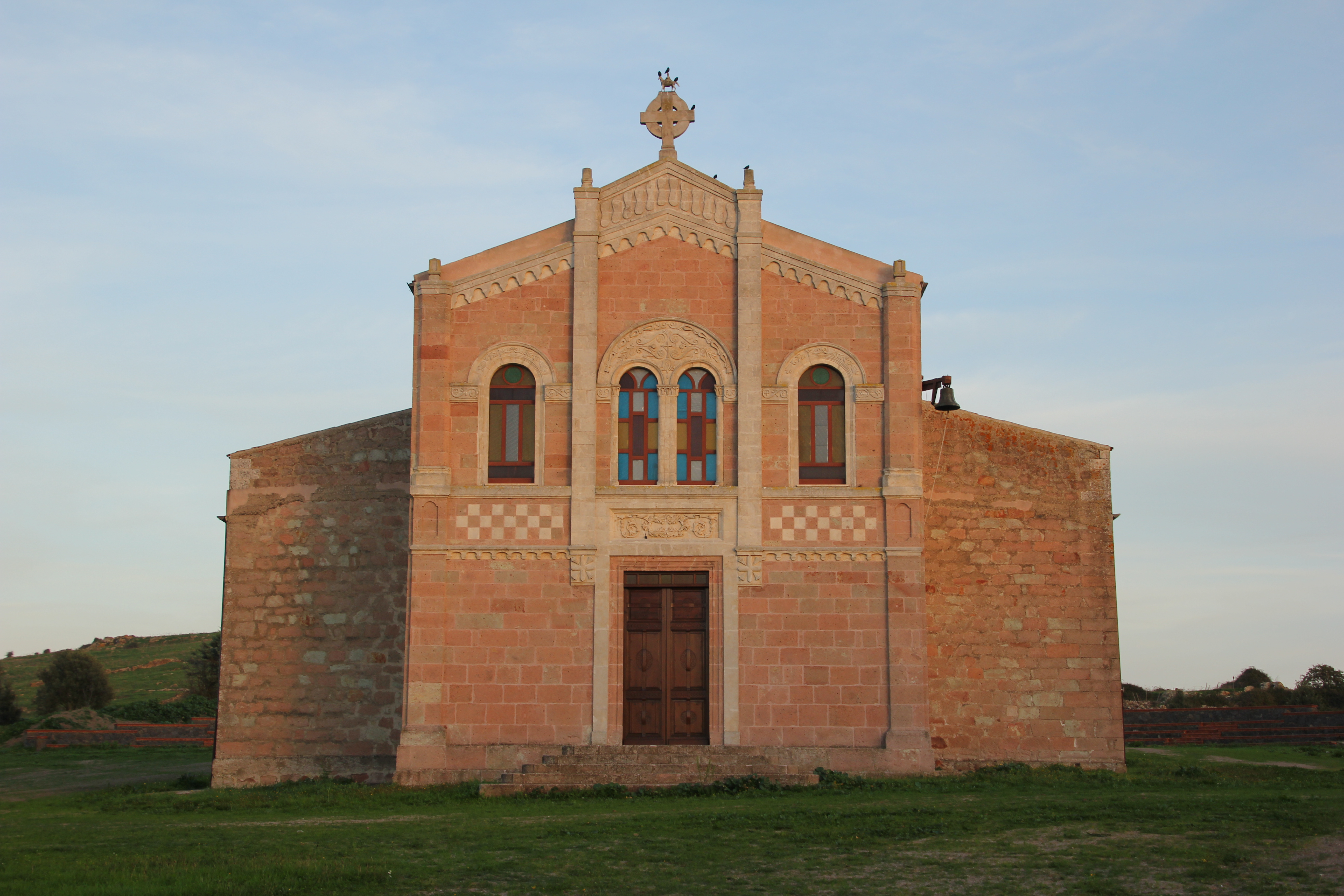 Pozzomaggiore - Chiesa di San Costantino